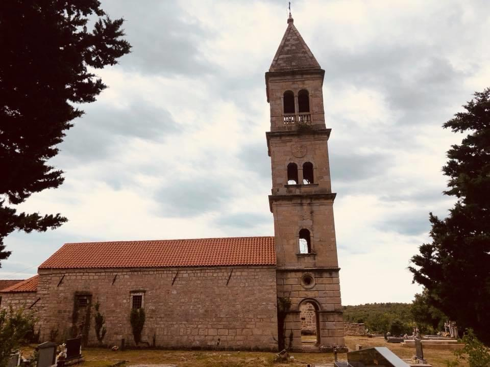 Crkva Svetog Nikole u Bratiškovcima